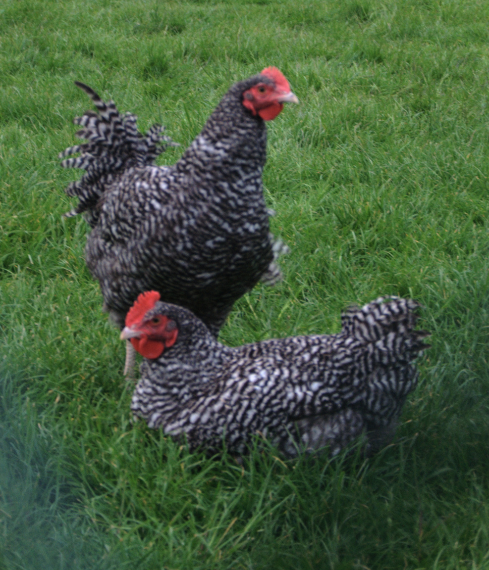 Poules Coucou de Rennes à l'Écomusée du pays de Rennes.